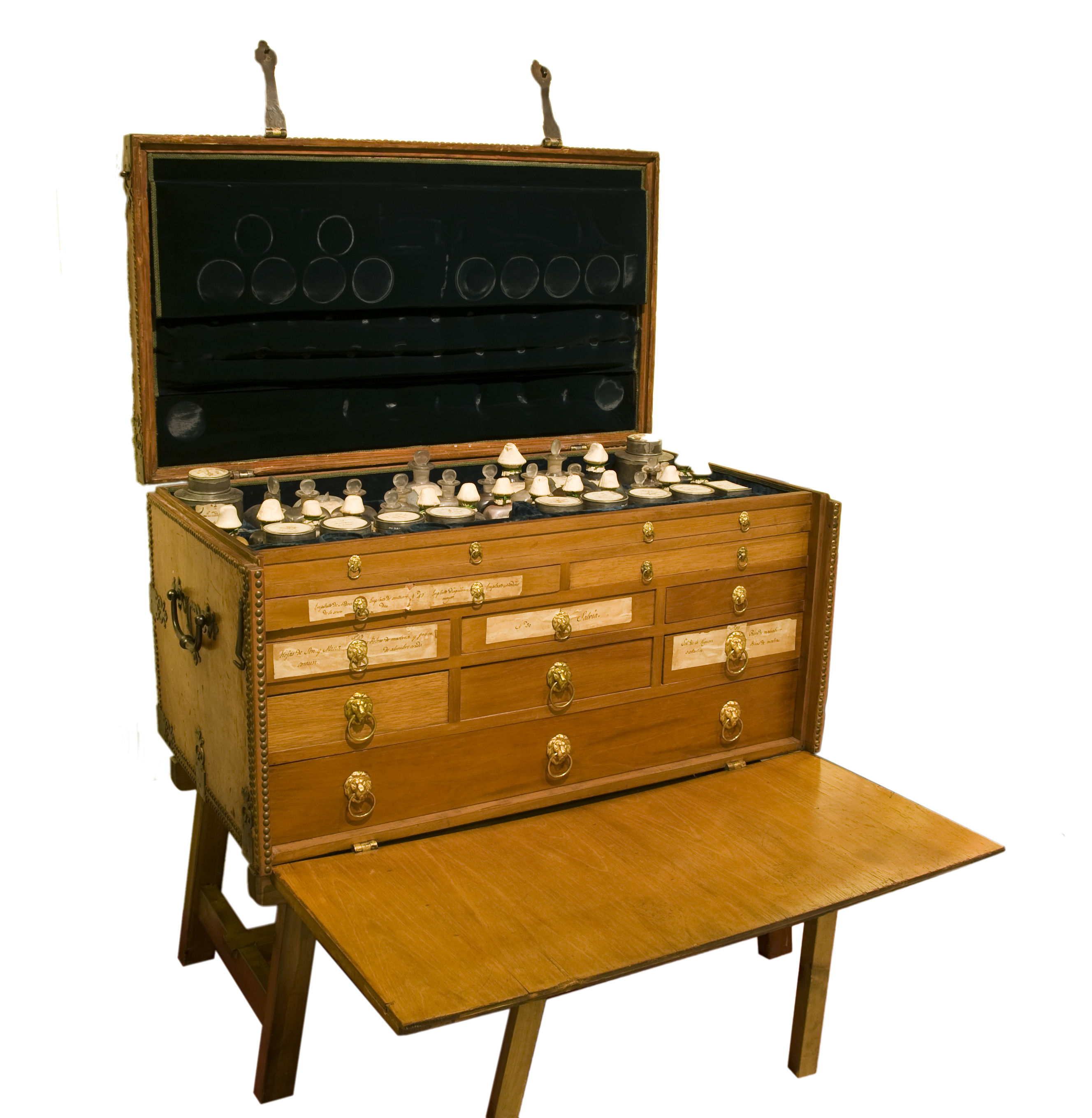 Botiquín de Manila, Siglo XIX